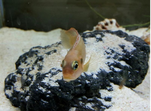 람프롤로그스 오셀라투스